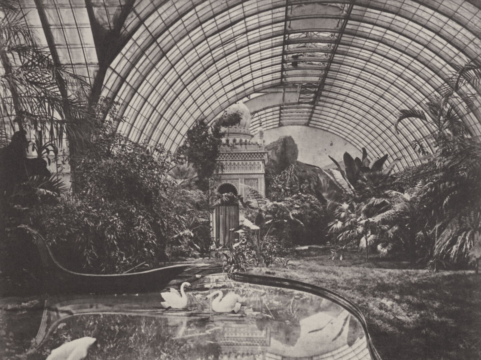 Albert, Joseph: München, Residenz – Wintergarten König Ludwigs II., nach Westen